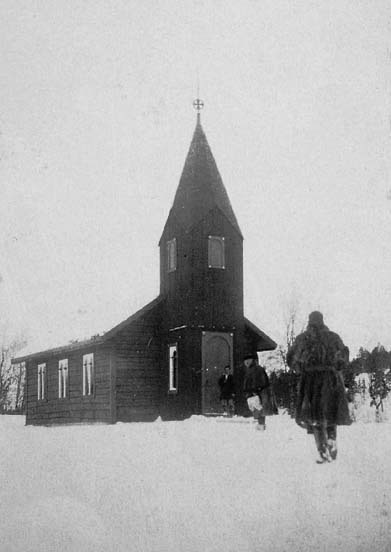 Bæivasgiedde kapell (chapel) in Karasjok, Norway